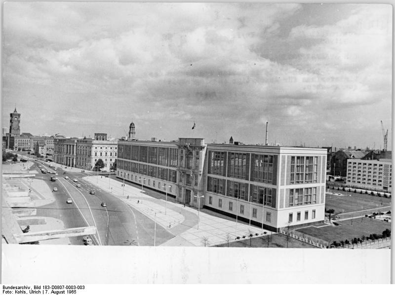 Berlin, Staatsratsgebäude, Marstall, Rotes Rathaus Zentralbild Kohls Pr-7.8.1965 Das Staatsratsgebäude am Marx-Engels-Platz in Berlin vom Neubau des Ministeriums für Auswärtige Angelegenheiten aus gesehen.